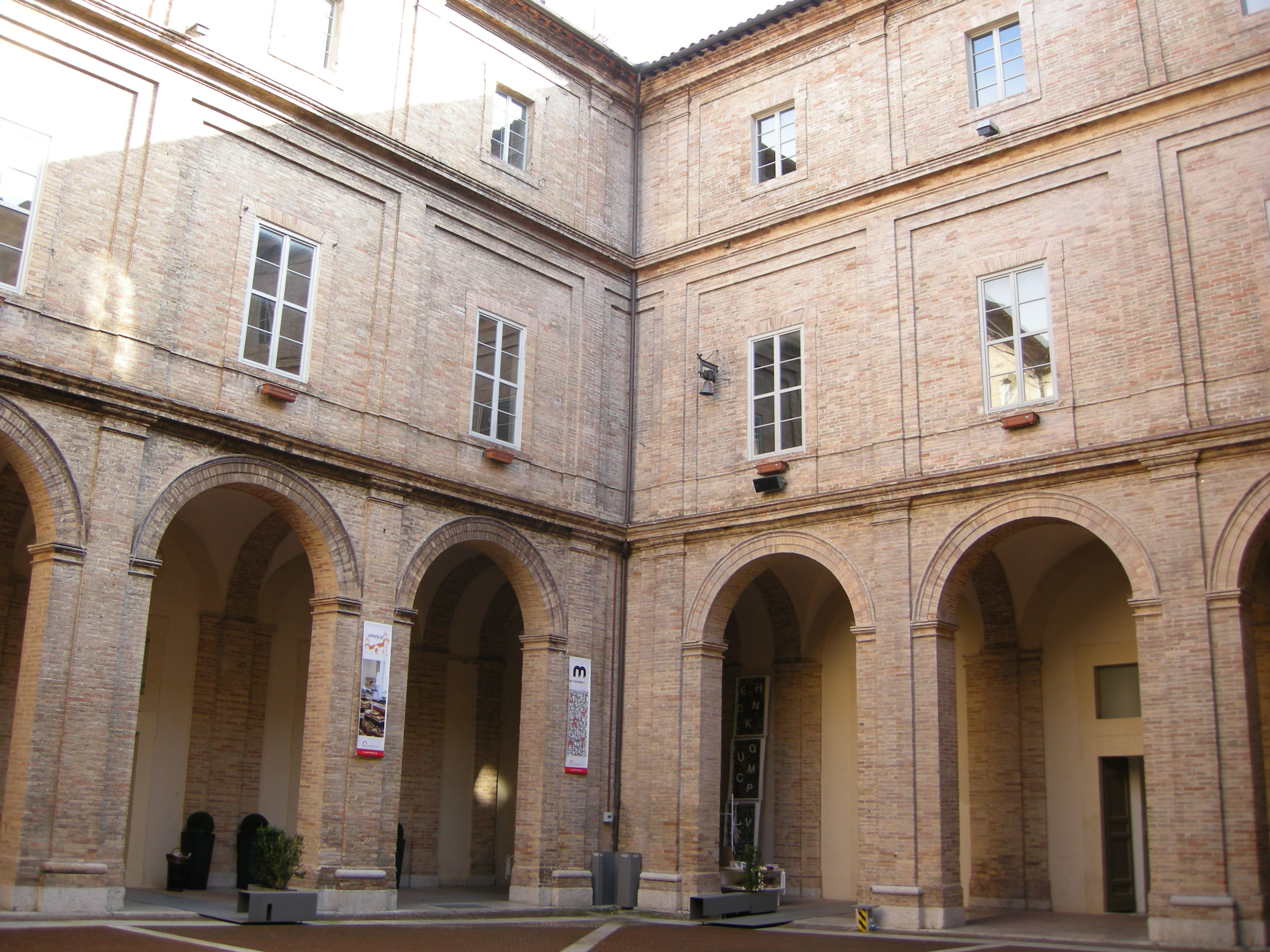 Urbino, collegio raffaello, cortile